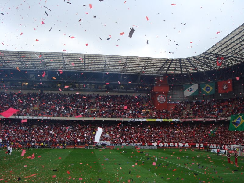 Descrição